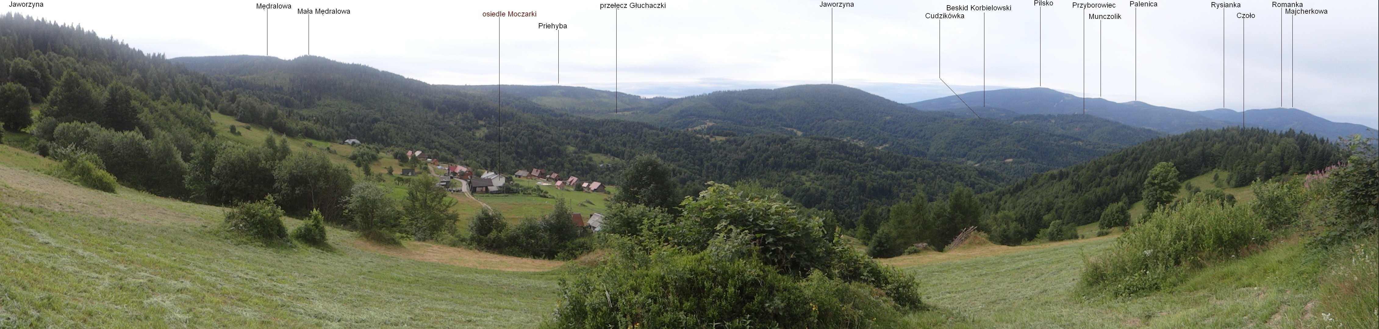 Panorama widokowa z przełęczy między Kalikowym Groniem a Małą Mędralową